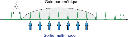 Schéma du peigne de modes de l'onde signal et de la courbe de gain d'un OPO. Sources : Personnelle.